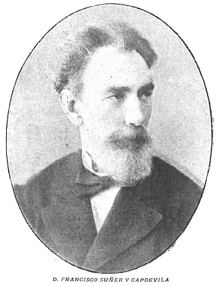 Retrato de Francisco Suñer y Capdevila, publicado en la revista española Nuevo Mundo.